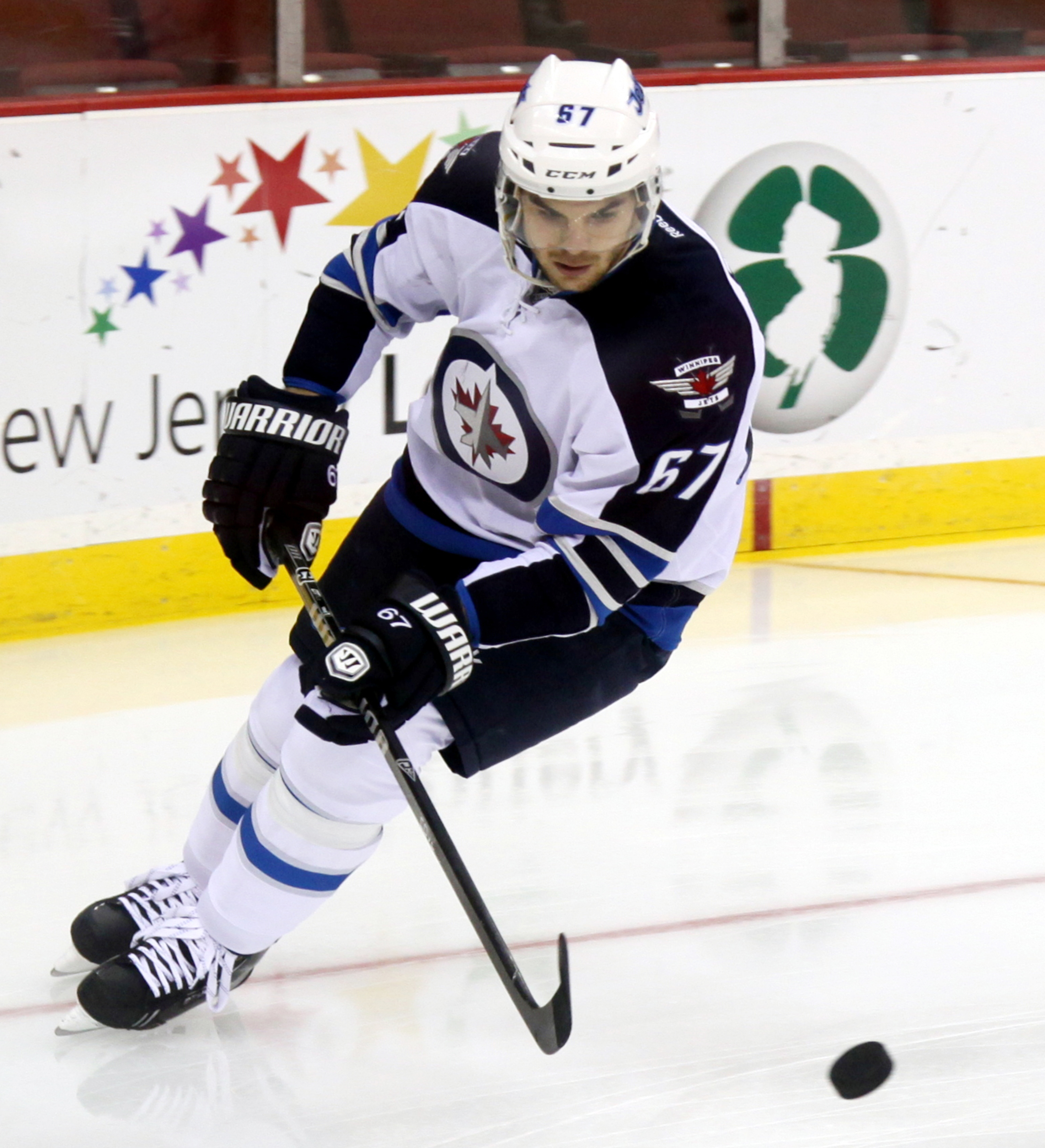 Frolik in 2013.